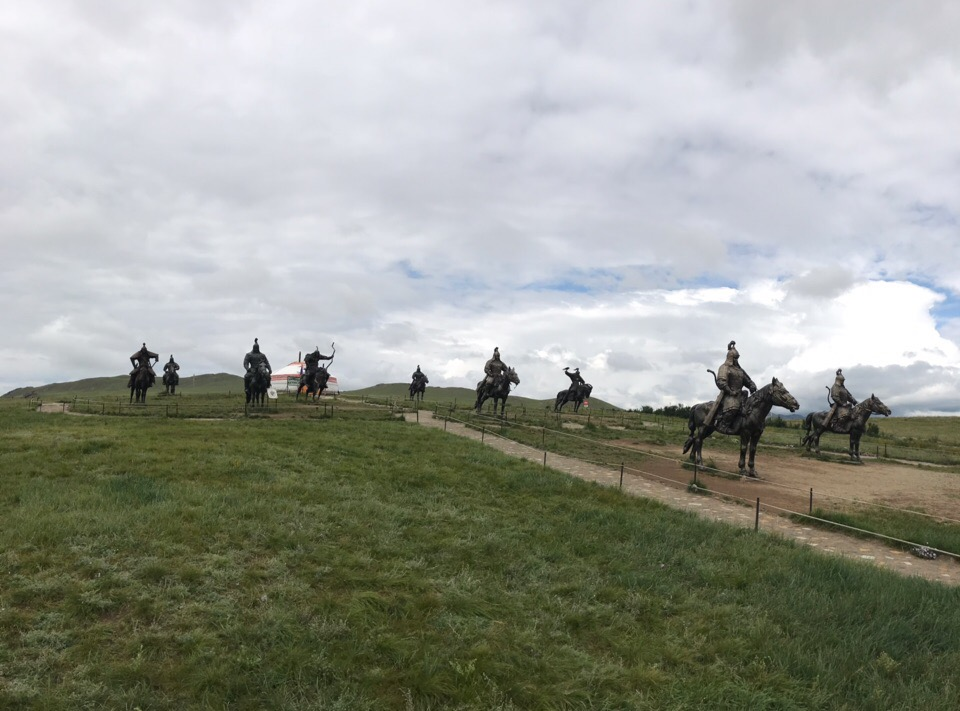 Скульптуры девяти нукеров возле статуи Чингисхана в Цонжин-Болдоге